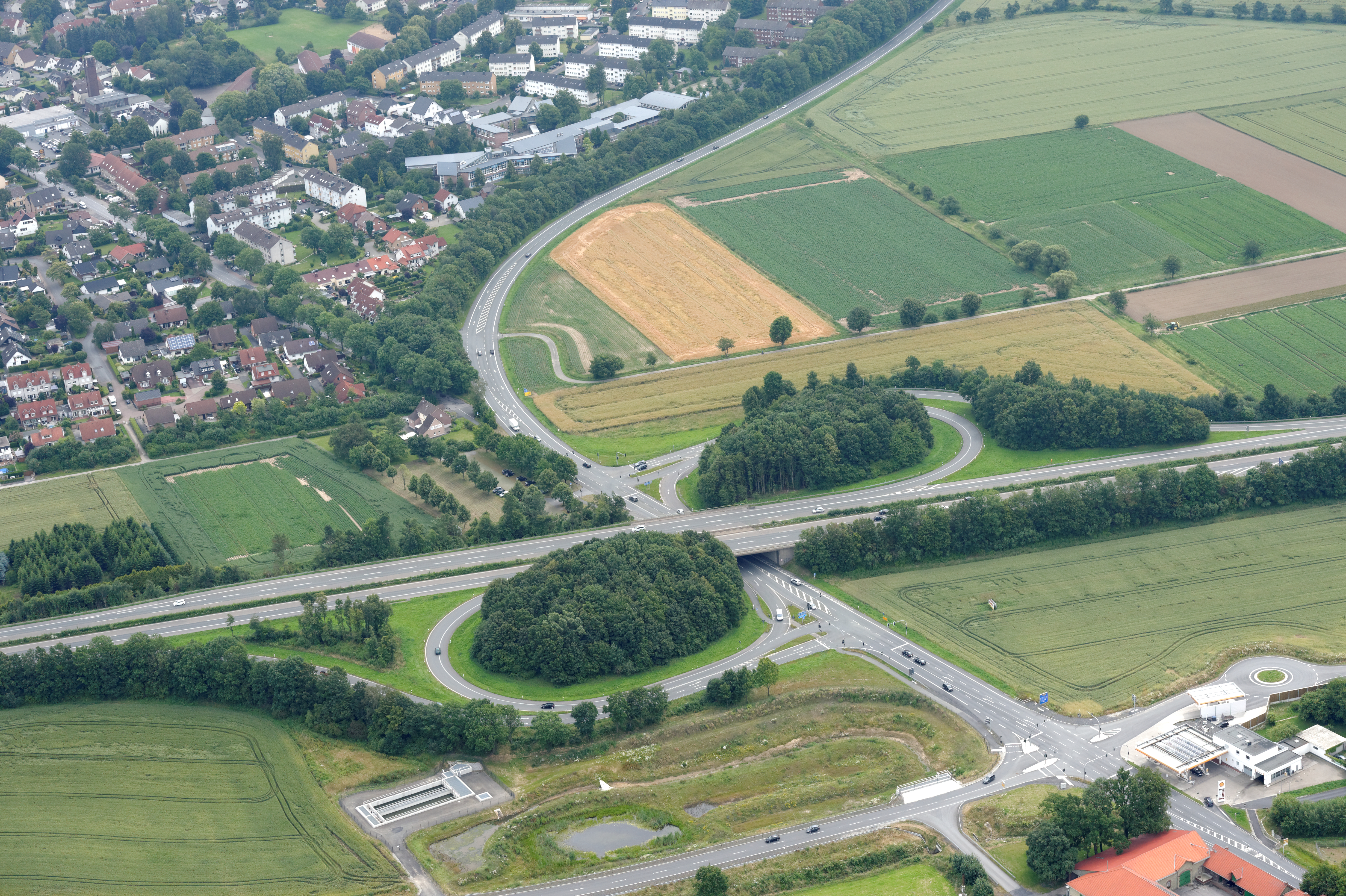 Anschlussstelle Werl-Zentrum der Bundesautobahn 445, Bundesstraße 1, südwestliches Werl, Blickrichtung Ost. Fotoflug Sauerland-Nord. The making of this document was supported by the Community-Budget of Wikimedia Germany.